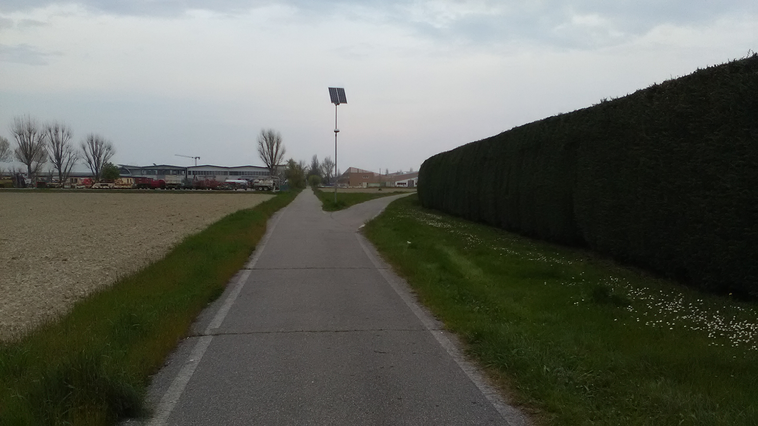 Ex ferrovia Modena-Mirandola - bivio di Villafanca